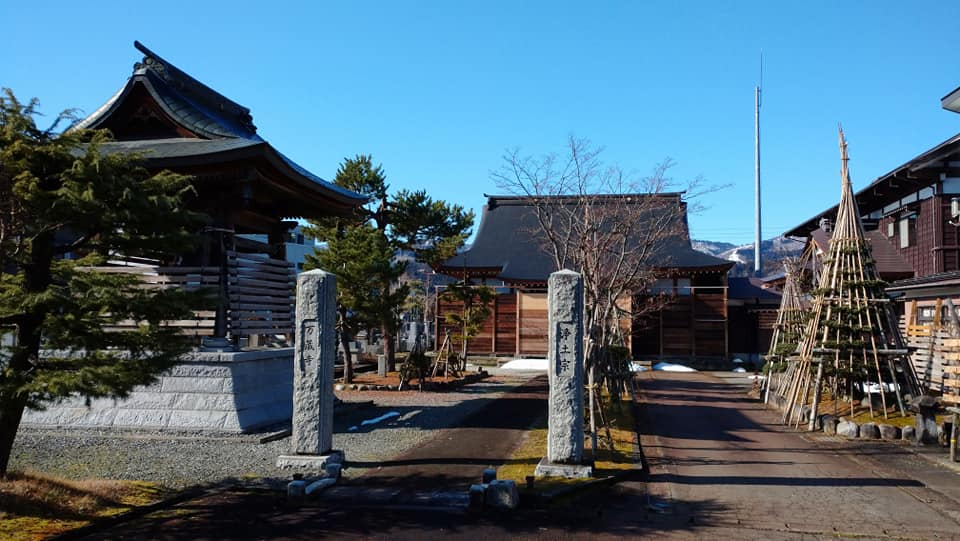 万蔵寺 2020-01-11